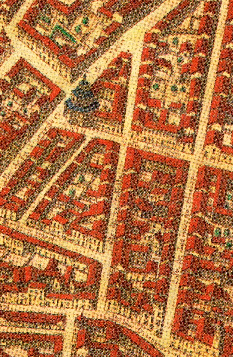 Topografía de la Villa de Madrid descrita por Don Pedro Texeira en 1656, en la cual se demuestran todas las calles al largo y ancho de cada una de ellas, las rinconadas y lo que tuercen las Plazas, fuentes, jardines y huertas con la disposición que tienen las parroquias, Monasterios y Hospitales están señalados sus nombres con letras y números que se hallaran en la tabla y los demás edificios, torres y delanteras de las casas de la parte que mira al Mediodía están sacadas al natural que se podrán tocar las puertas y ventanas de cada una de ellas.